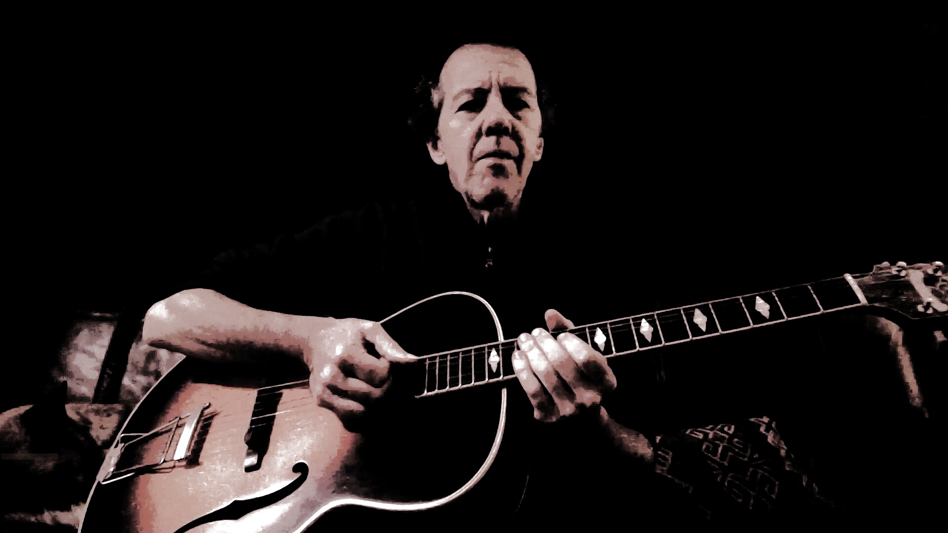 Nuno Rebelo